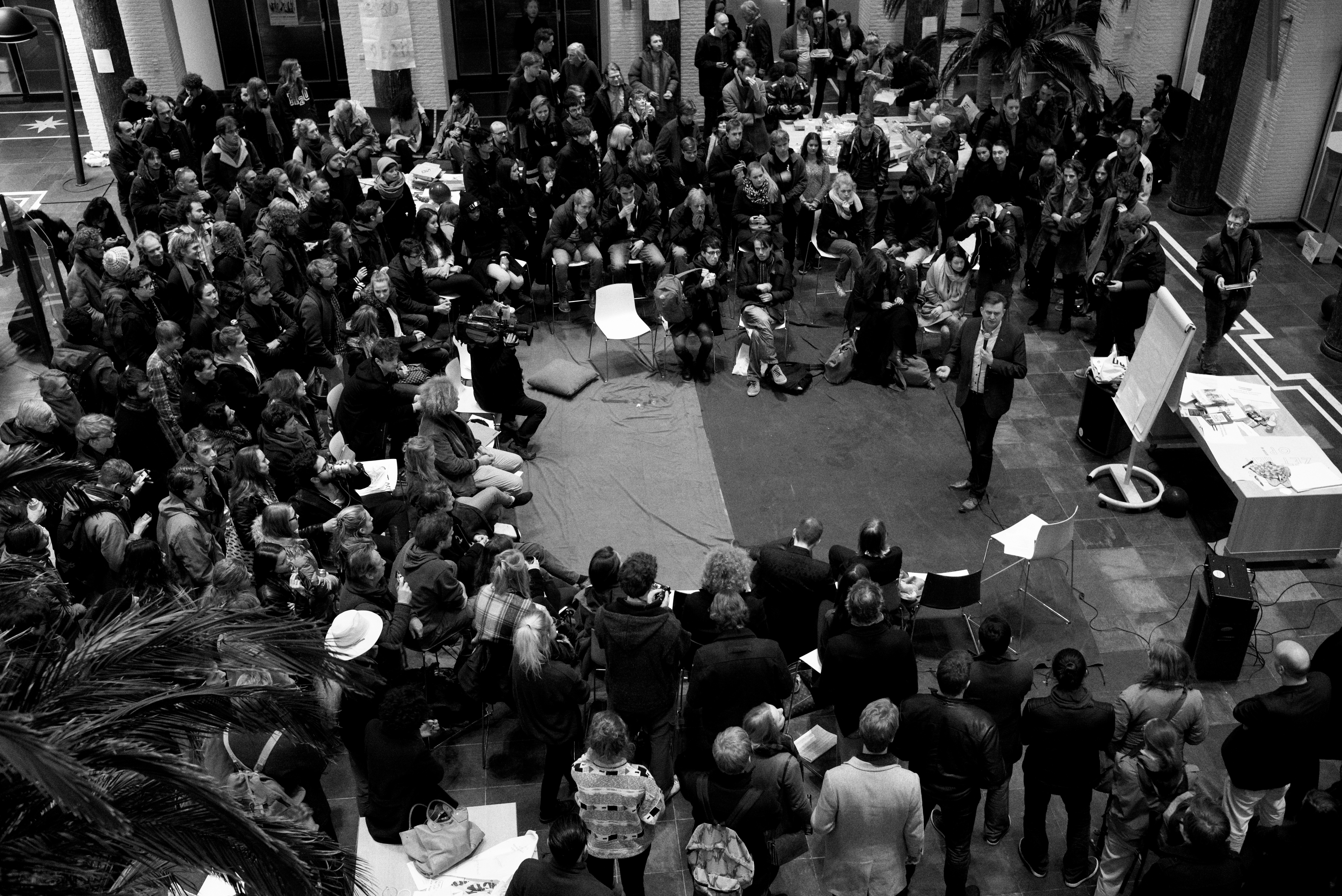 L1002099